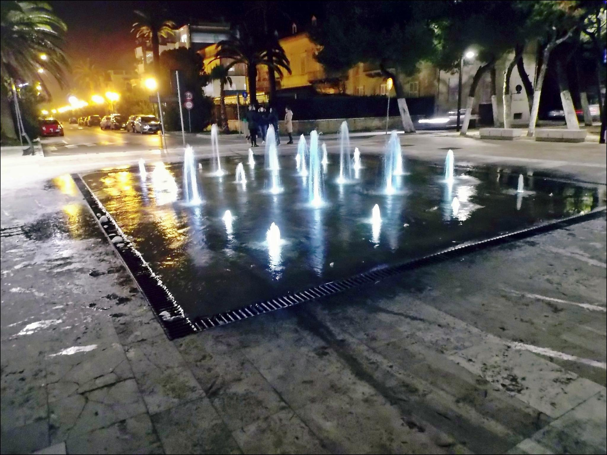 Fontana con giochi d'acqua nella piazza Kursaal